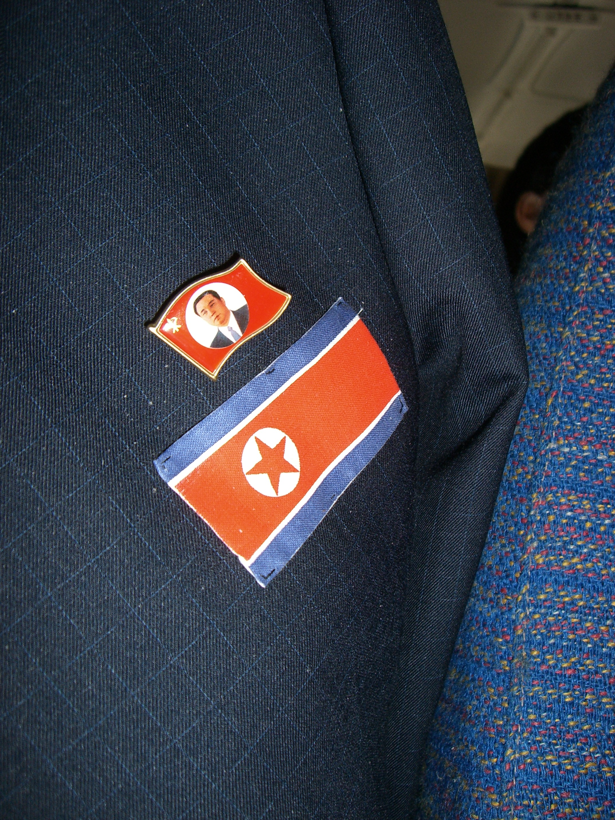 North Korea — Kim Il-sung Pin